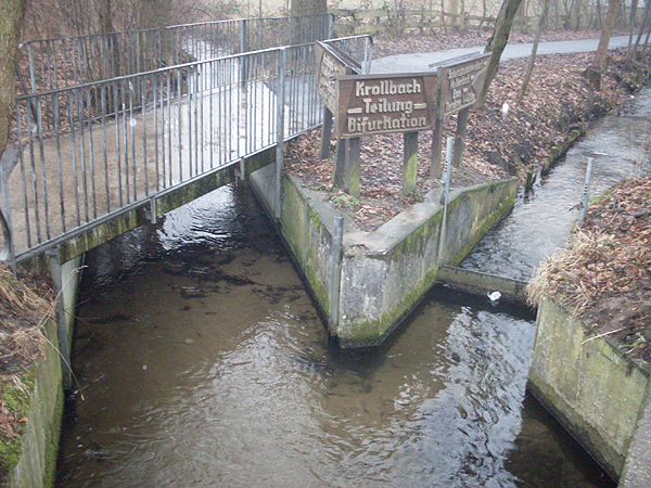 Krollbach-Bifurkation in Hövelhof, rechtsseitig zweigt der Schwarzwasserbach ab.